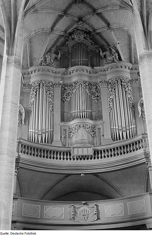 Original image description from the Deutsche Fotothek Silbermann-Orgel im Dom